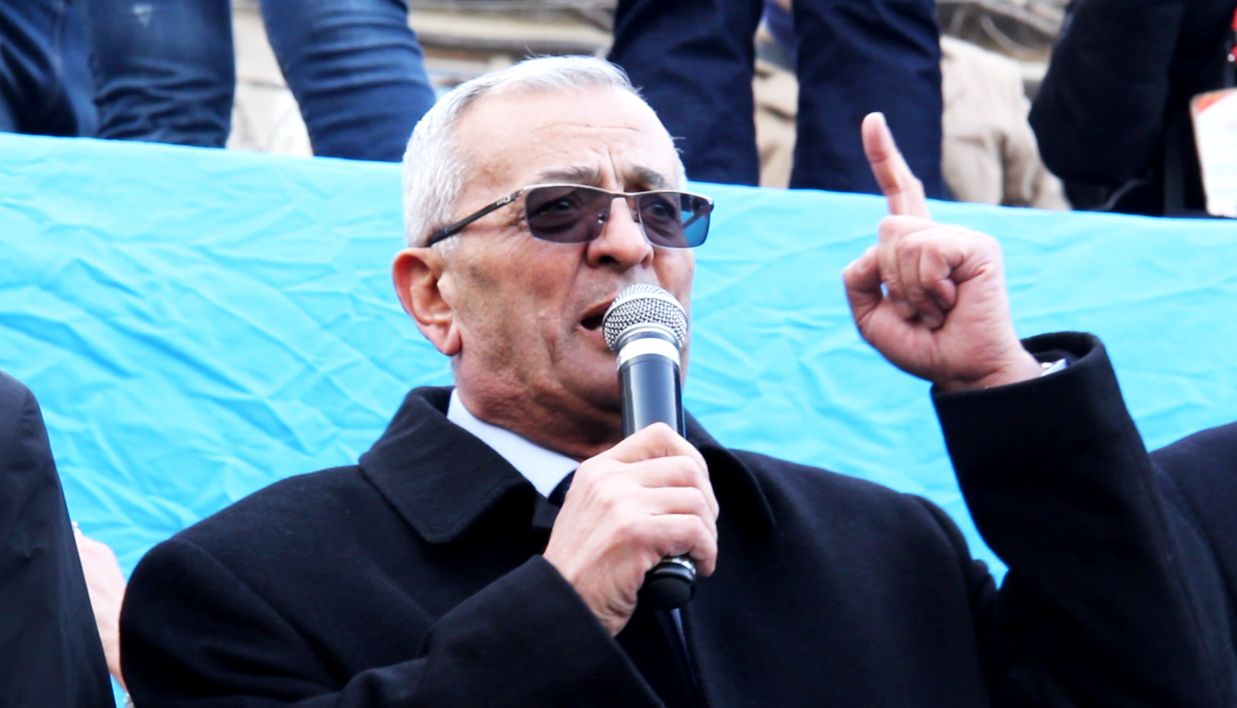 İsgəndər Həmidov mitinqdə